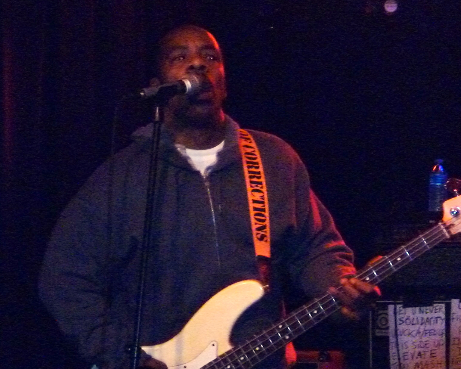 Skeeter Thompson of Scream live im Kleinen Klub (Saarbrücken)